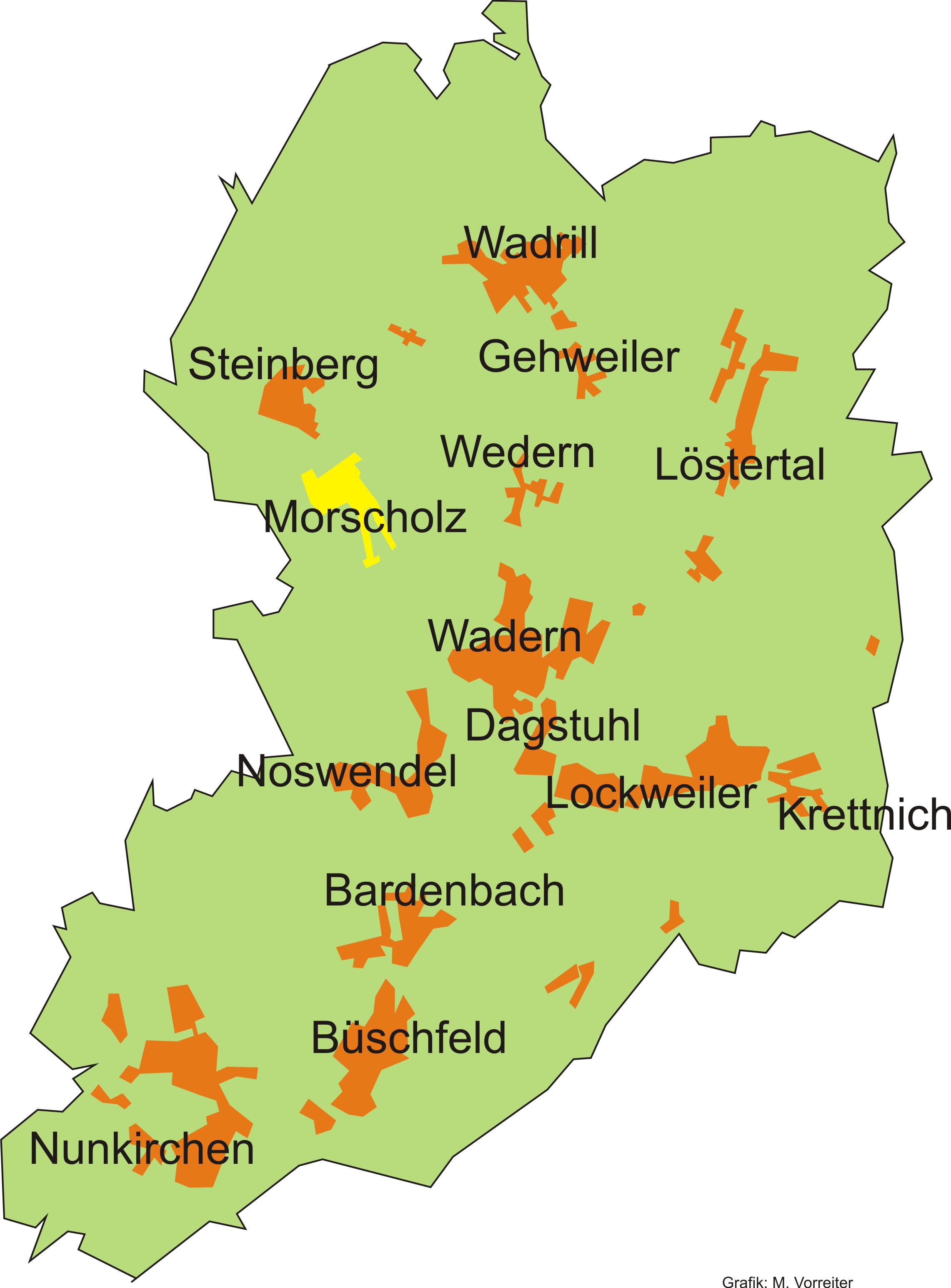 Lage des Stadtteils Morscholz innerhalb der Stadt Wadern